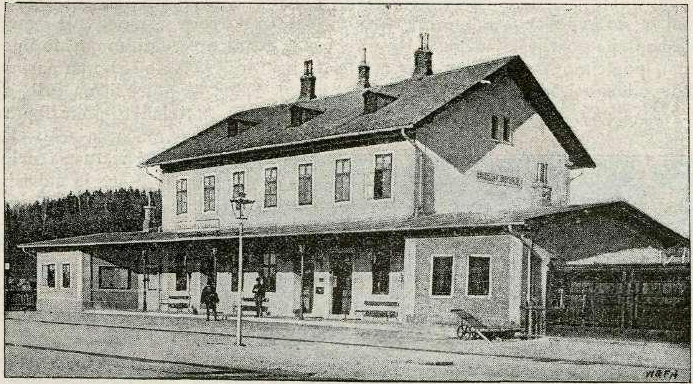 Postaja Grosuplje.